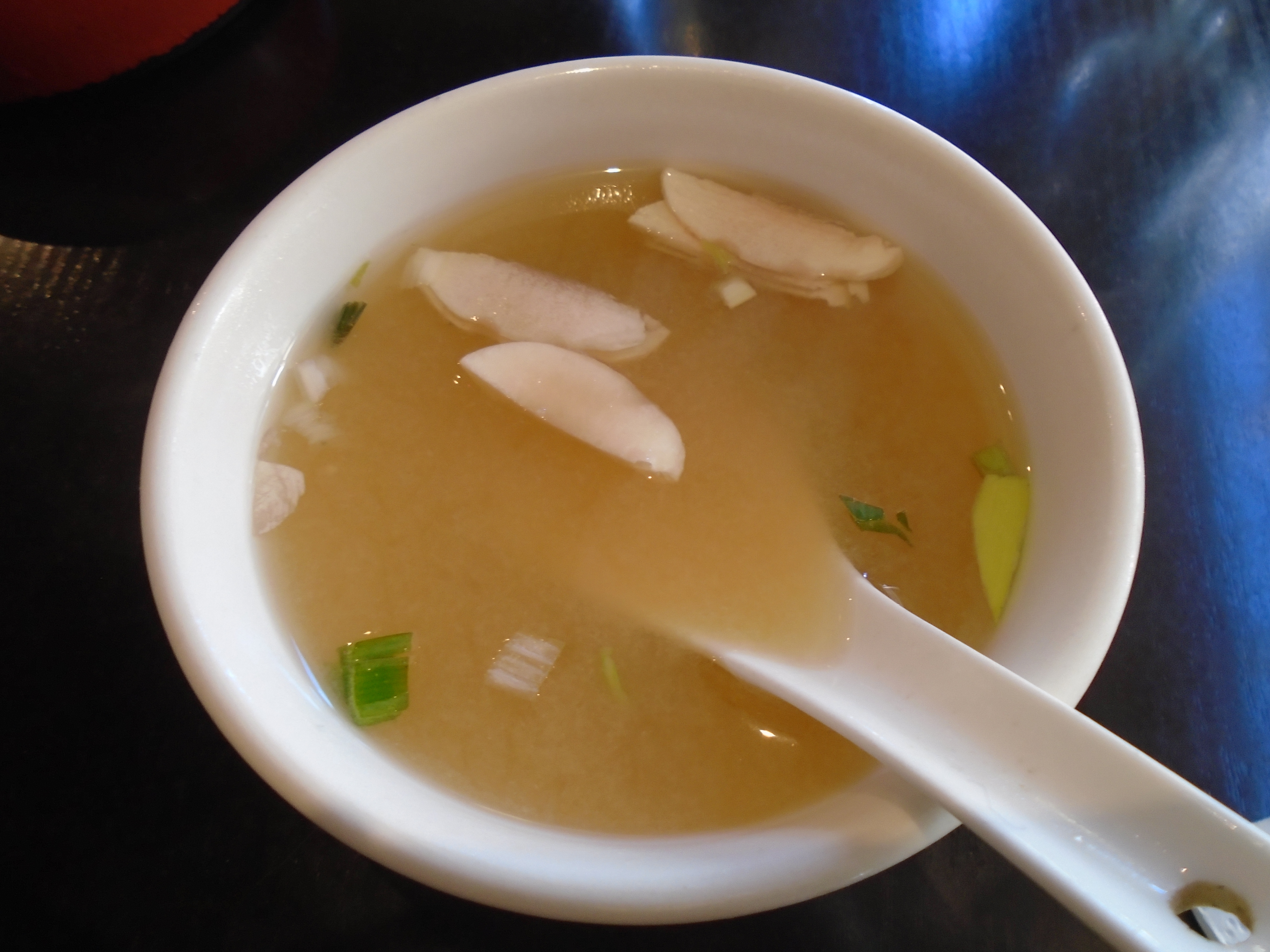 Miso soup @ Starter @ Madama @ Montparnasse @ Paris